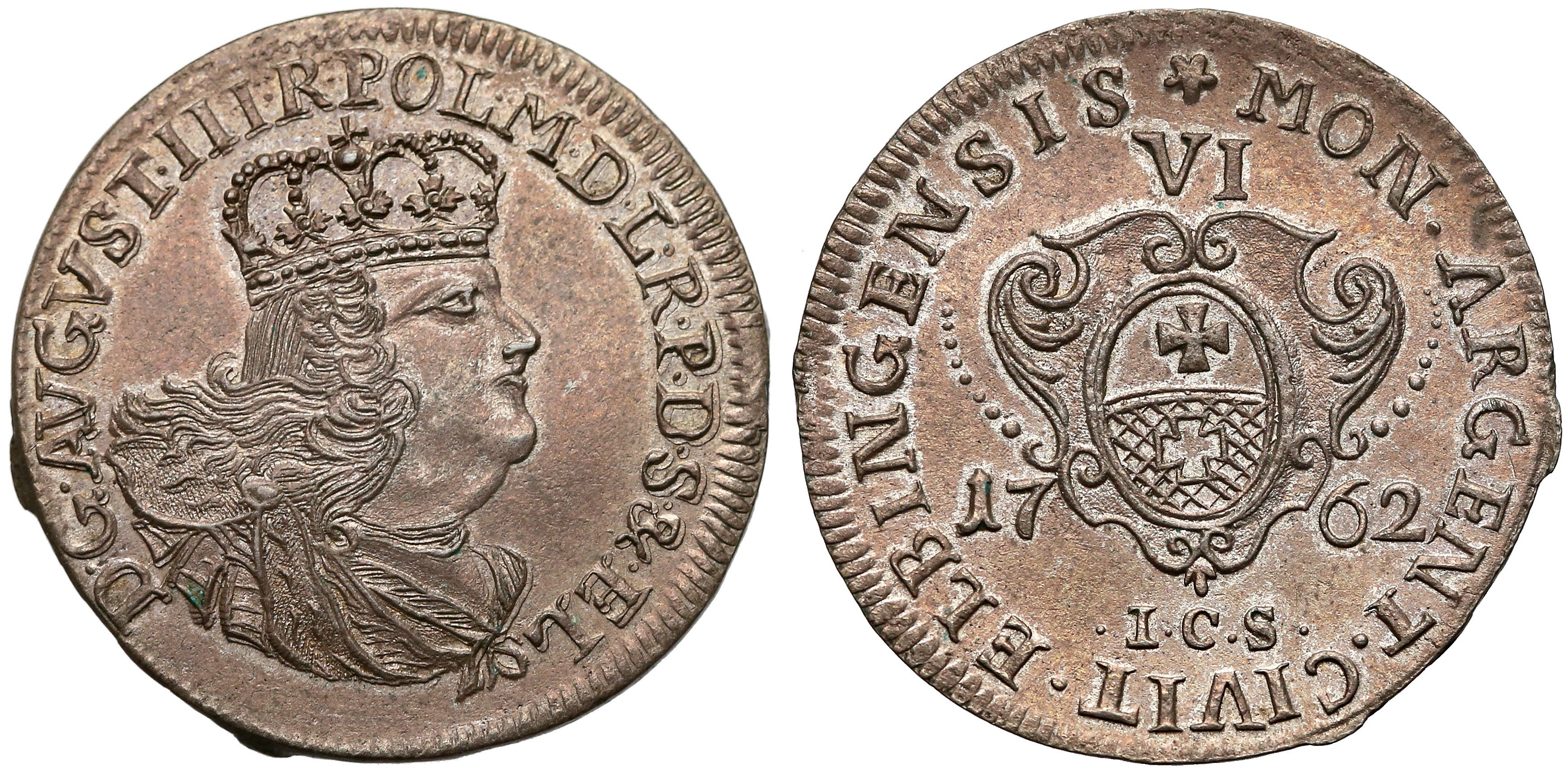 Szóstak miejski Elbląg 1762